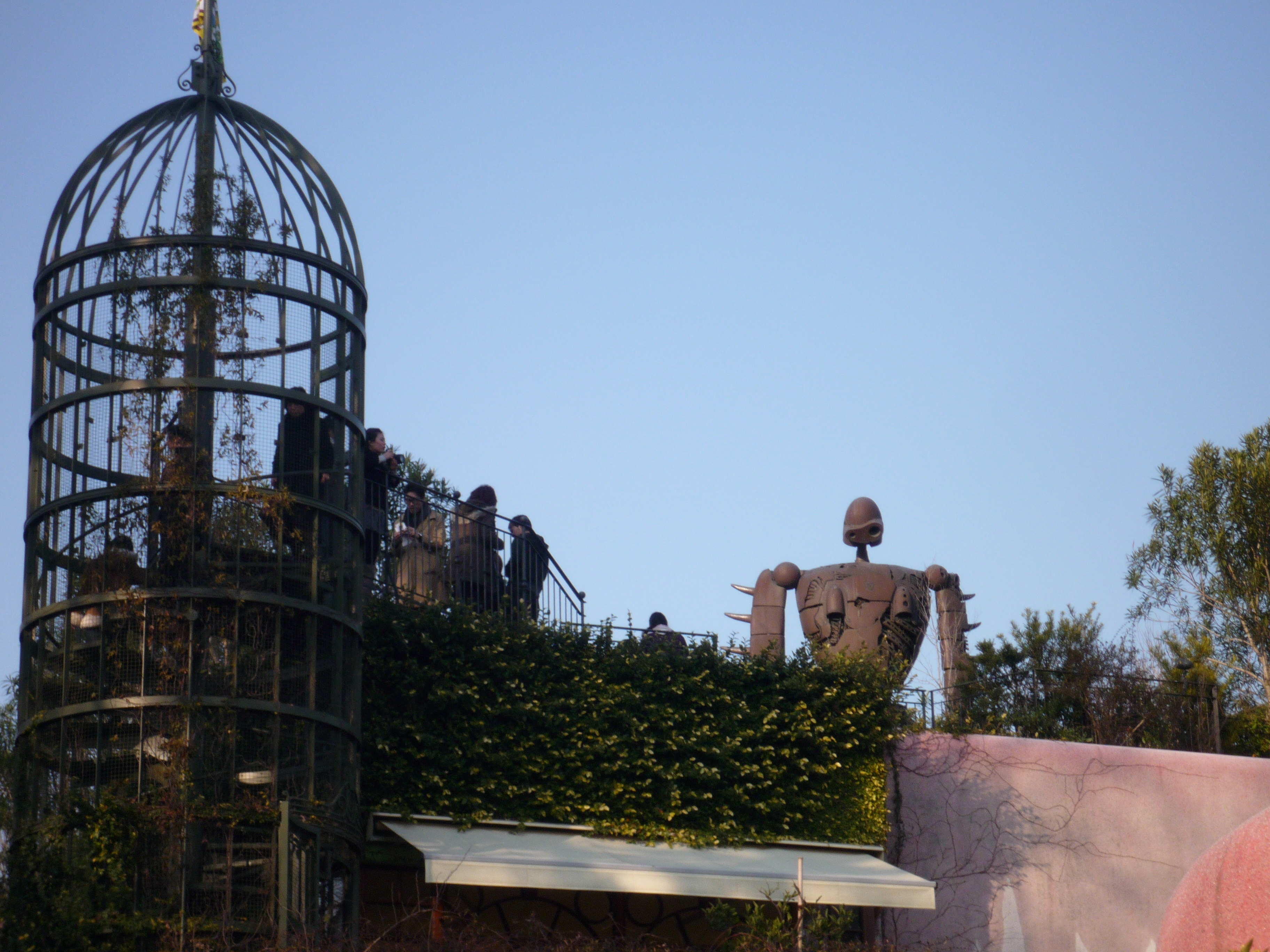 ジブリ /studio giburi